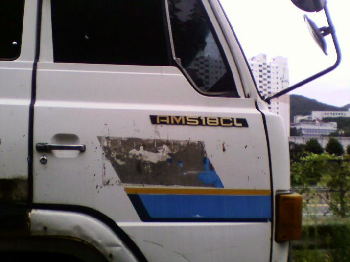 아시아 대형 카고트럭 AM518CL 앰블렘